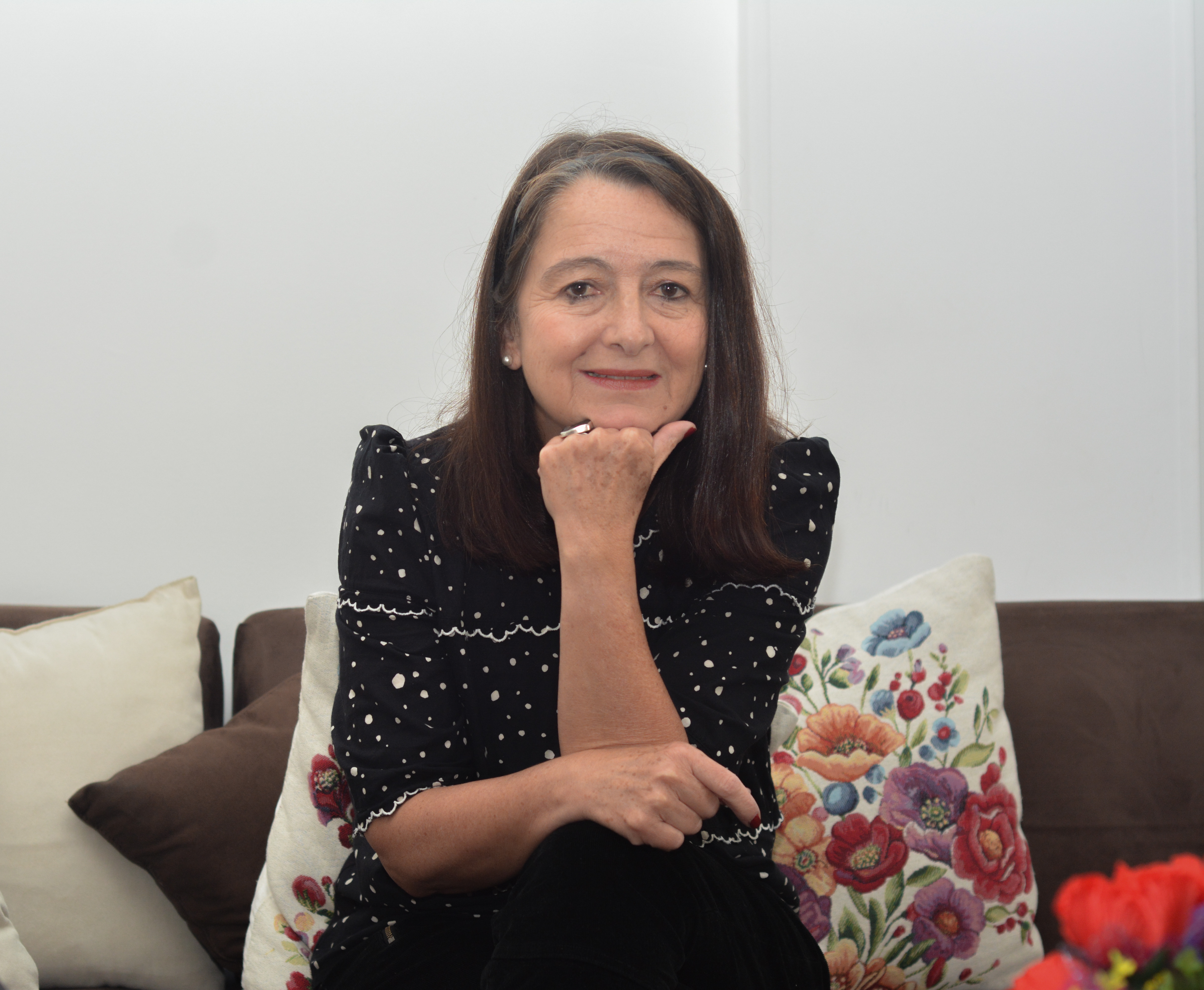 Autora Beatriz Helena Robledo. Tomada por: Lucas Tabares